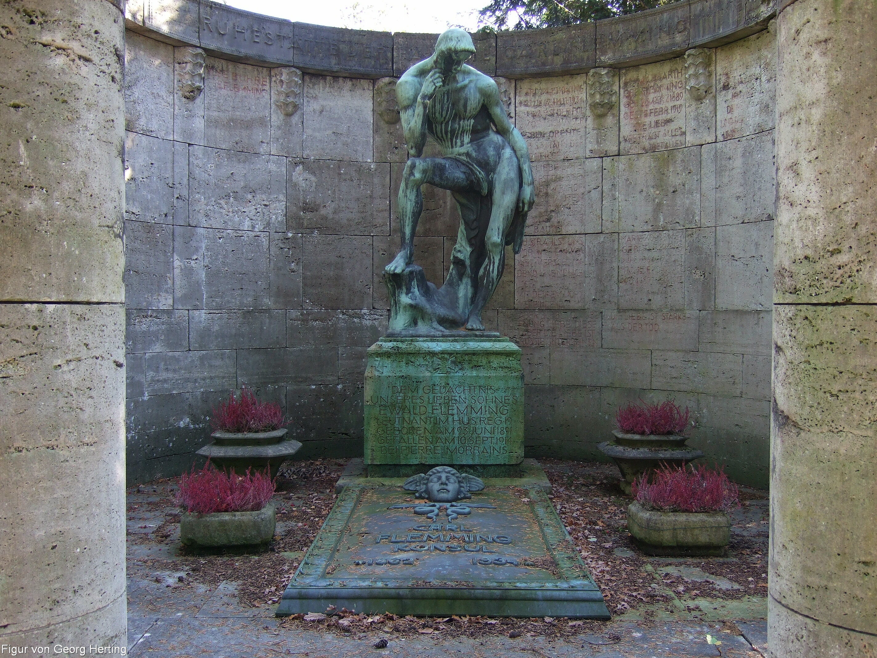 Für das Anfang der 1920er Jahre von dem Architekten Karl Siebrecht für die Familie des Industriellen Carl Flemming auf dem Stadtfriedhof Engesohde (Abteilung 29 E) in Hannover errichtete Grabmonument lieferte der Bildhauer Georg Herting die Skulptur im Zentrum zwischen den Steinsäulen ...